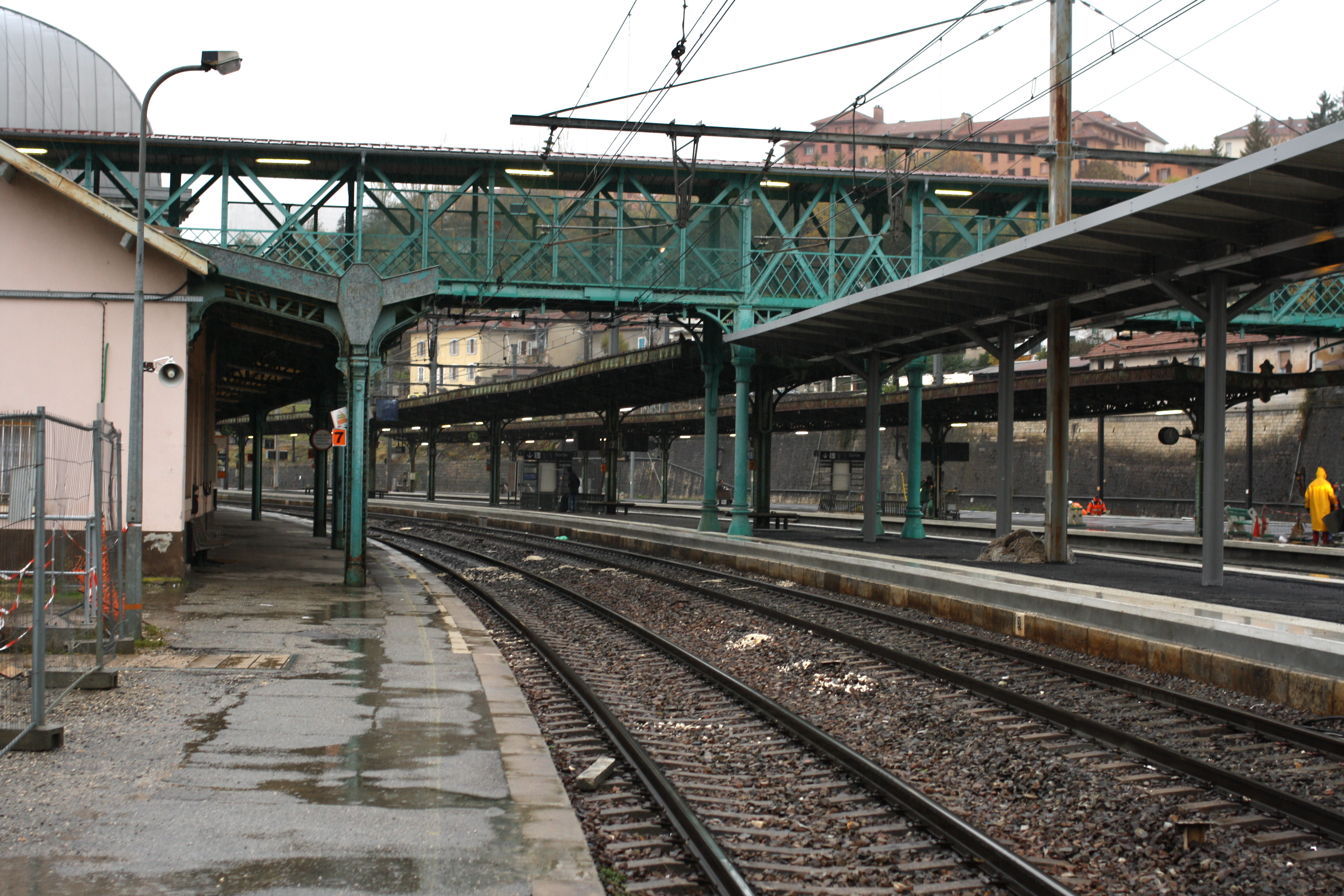 Ancienne gare de Bellegarde